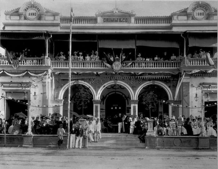 Repronegatief. Toeschouwers zitten op het bordes van de patisserie Grimm & Co. aan de Pasar Besar in Soerabaja te wachten op de optocht ter gelegenheid van de kroningsfeesten van Koningin Wilhelmina in 1898.